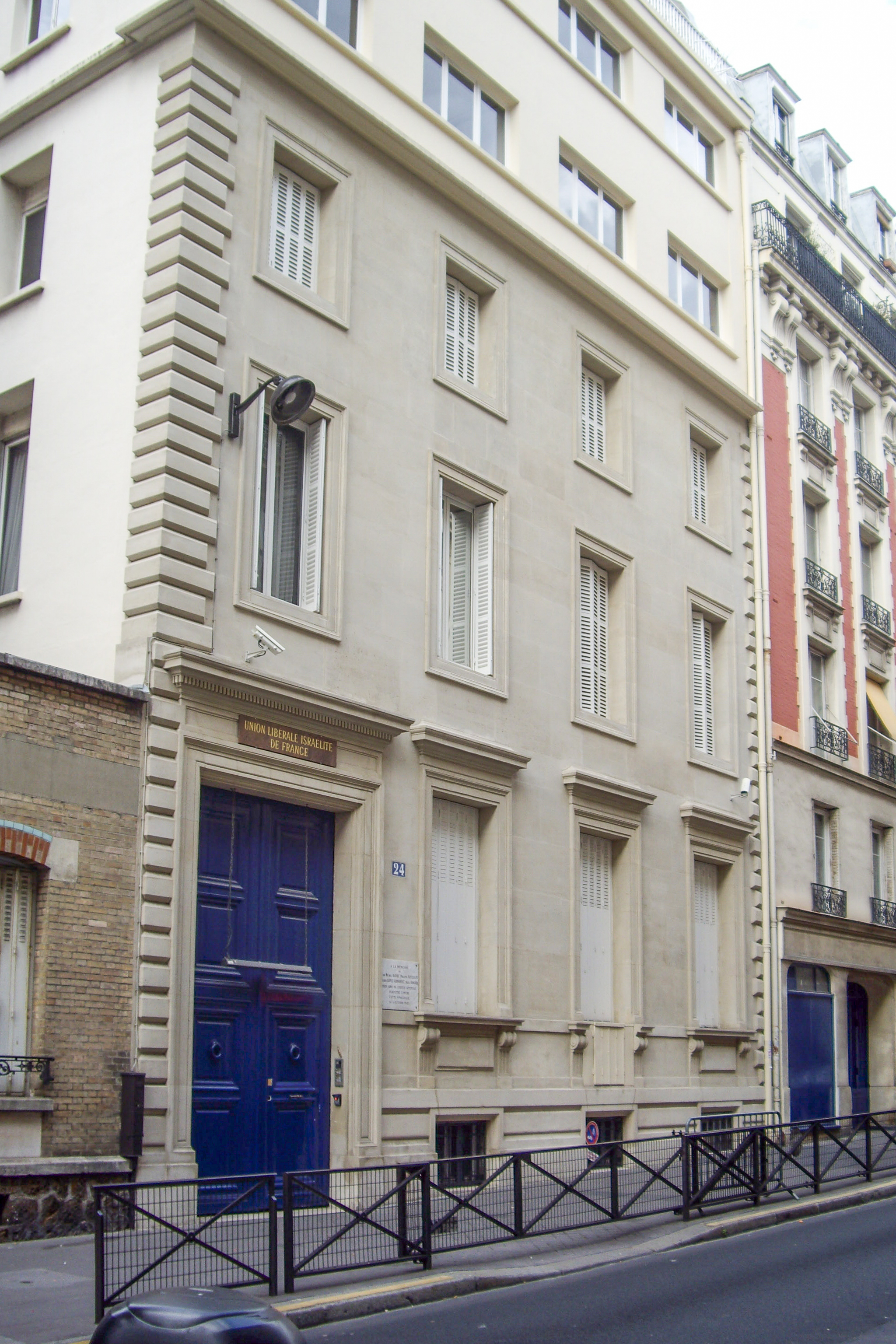 Siège et synagogue de l'Union libérale israélite de France, 24 rue Copernic, Paris 16e.